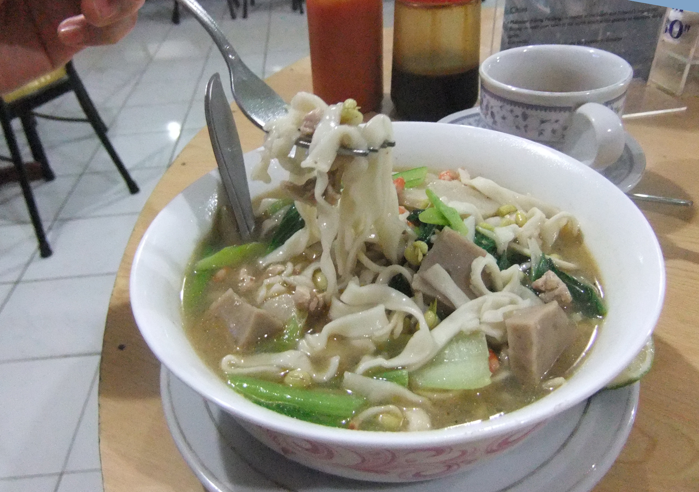 Kwetiau ayam udang di Rantepao